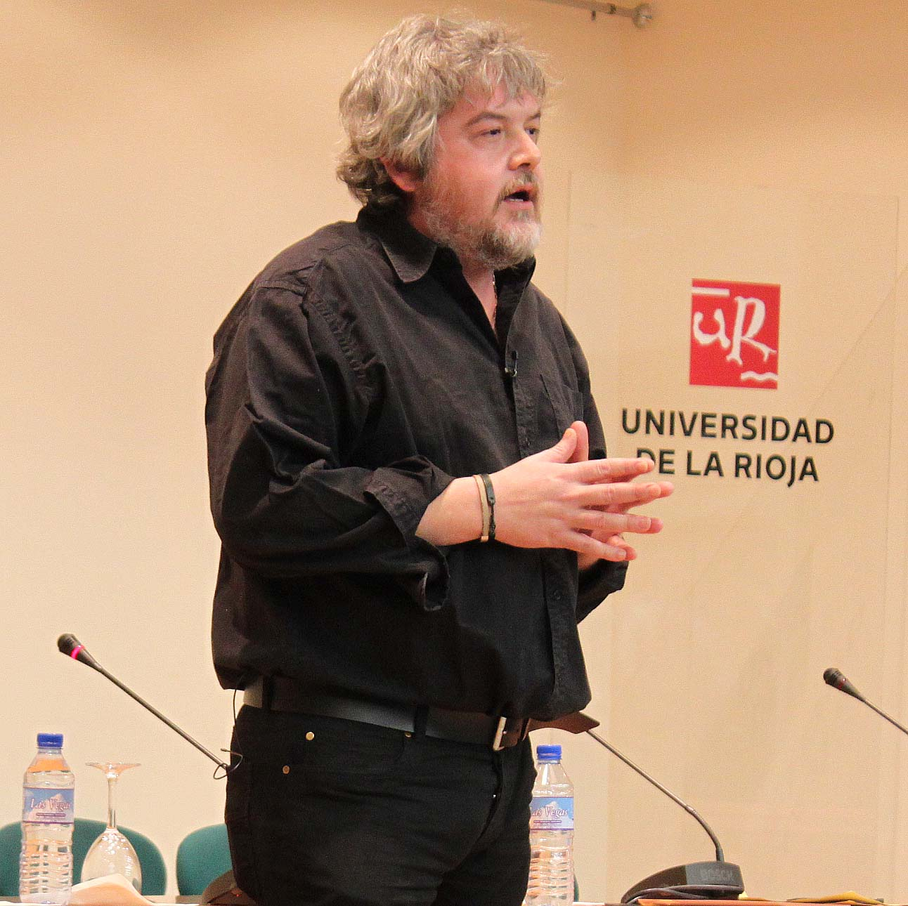 El humorista Javier Coronas, en la Universidad de La Rioja